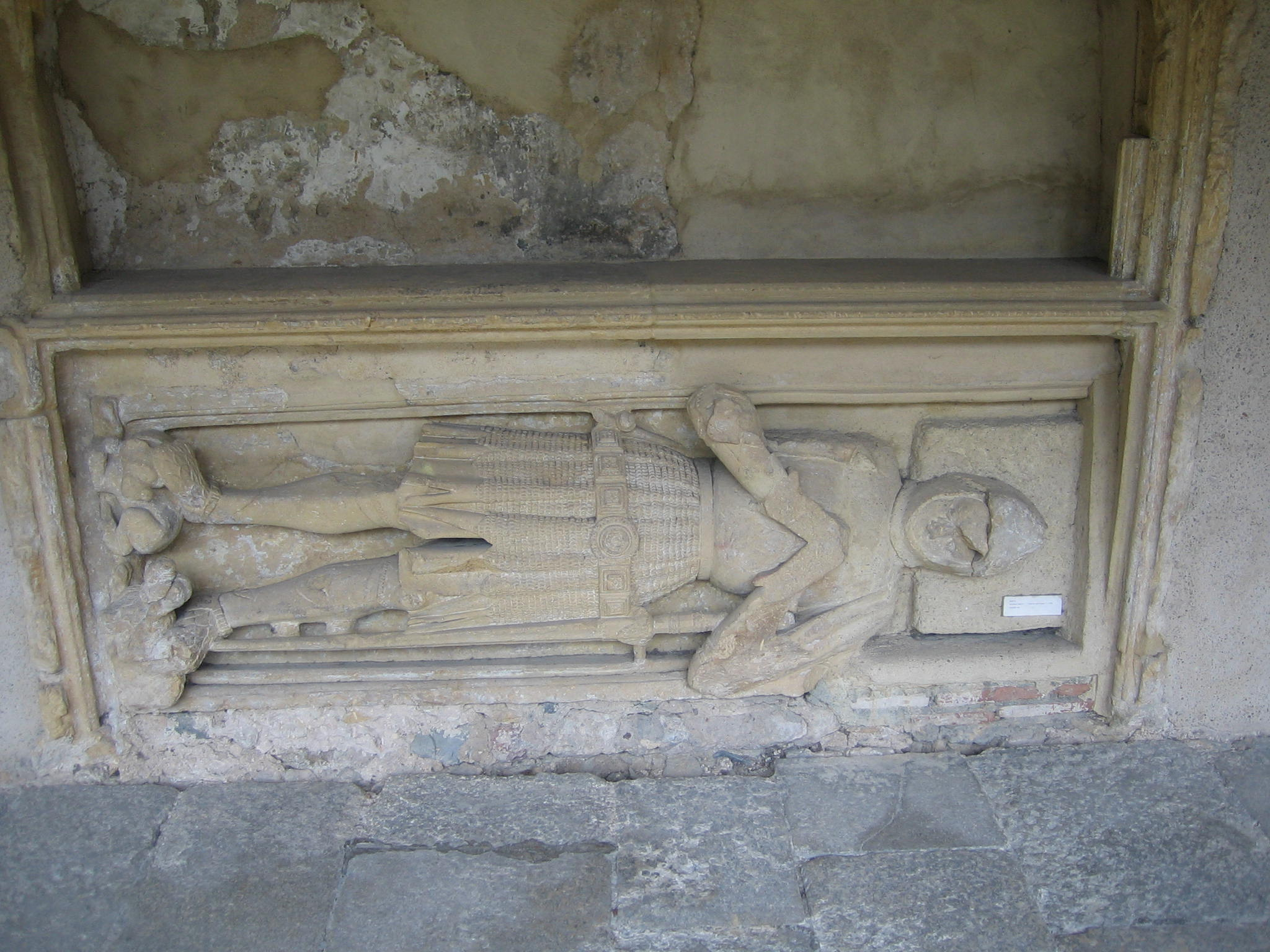 Couvent des Récollets de Metz, vue du cloître datant du XVe siècle. Gisant encastrés.